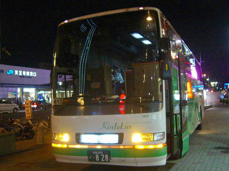 登録番号 京都200か・828 近鉄バス所属 車番2854 オランダ号用 2007年4月23日 あべの橋バスステーションにて撮影